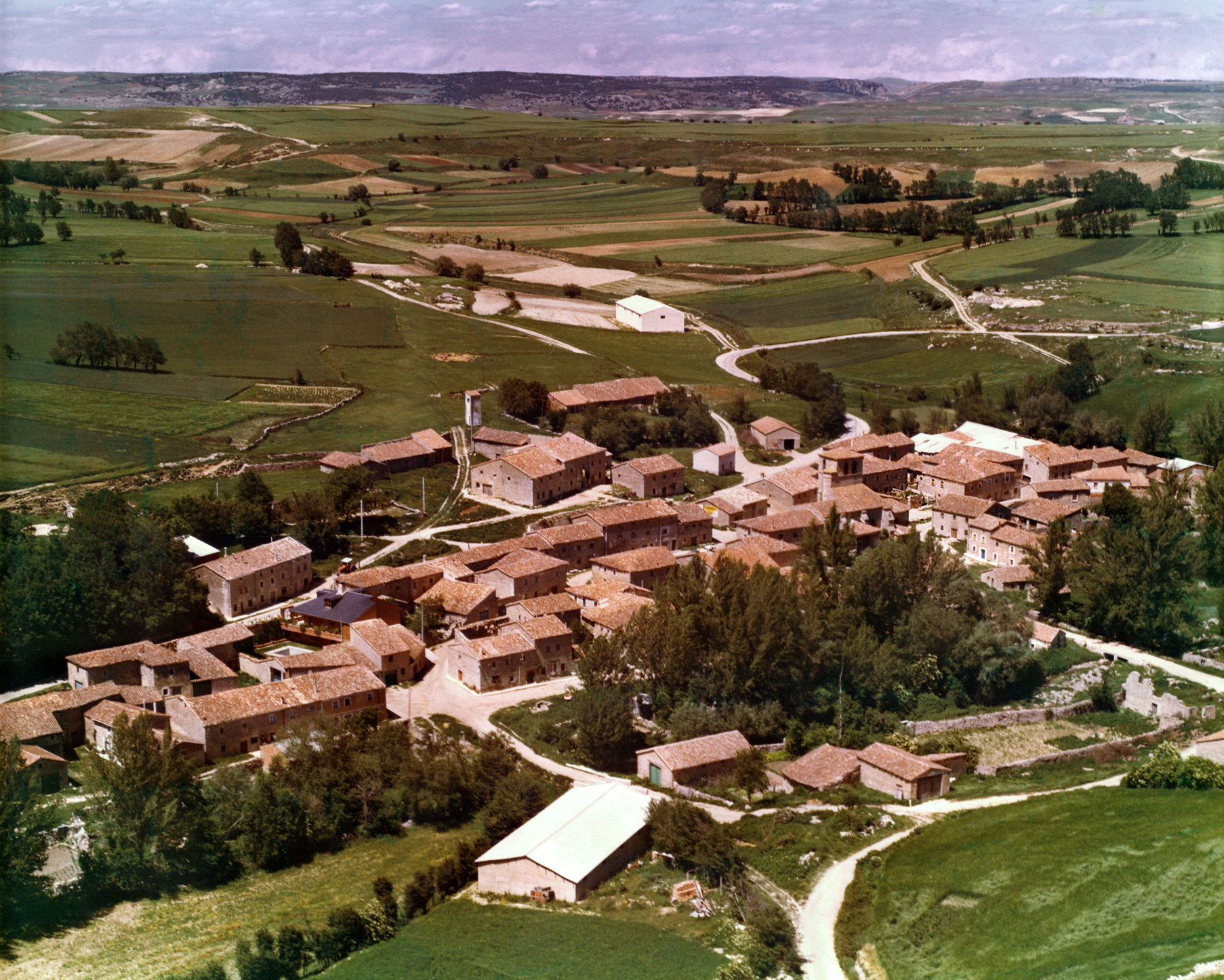 Panoramica de Hurones(Burgos)